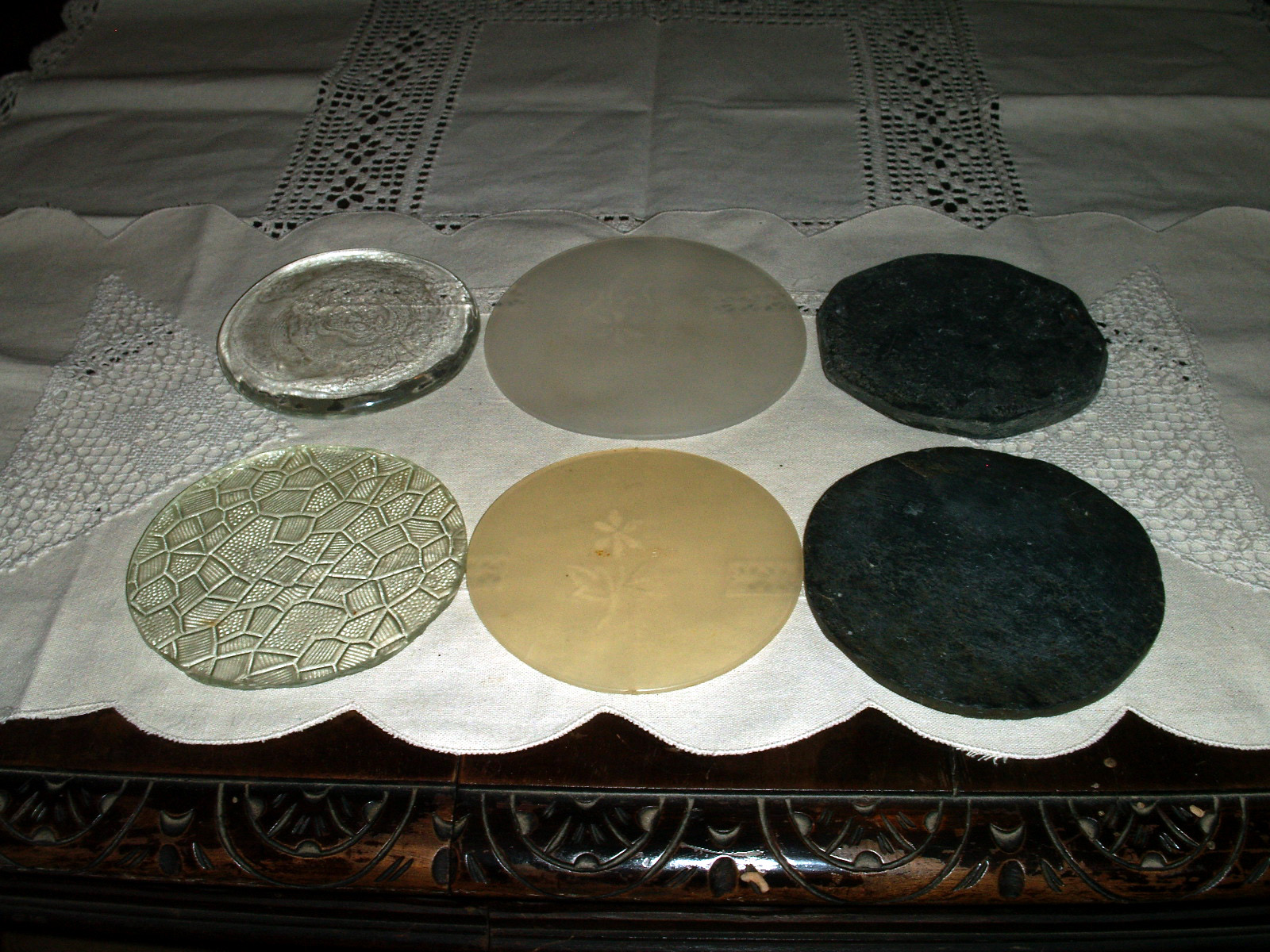 Conserva acciughe,tappi di vetro tagliato e fuso, tappi di plastica di varia misura e tappi di ardesia